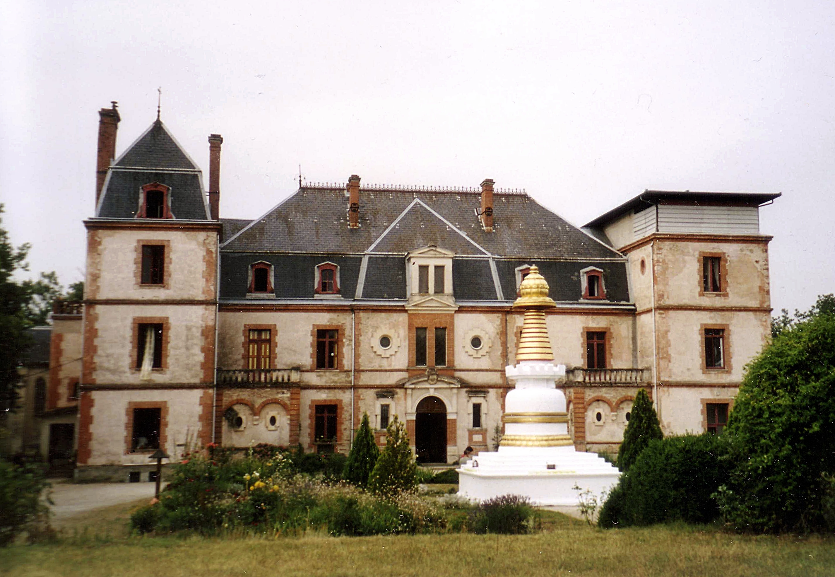 Stoupa devant l'institut Vajra Yogini, qui se trouve dans le Château d'en Clausade à Marzens dans le Tarn, France, non loin de Lavaur. On peut remarquer que l'une des deux ailes du château est en partie détruite. Cela a été causé par un incendie, et au lieu de réparer le château, le centre a préféré utiliser l'argent versé par les assurances pour acheter un autre bâtiment qui héberge une communauté monastique : Le monastère Nalanda.